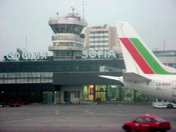 Aeropuerto de Sofia, bulgaria 2005